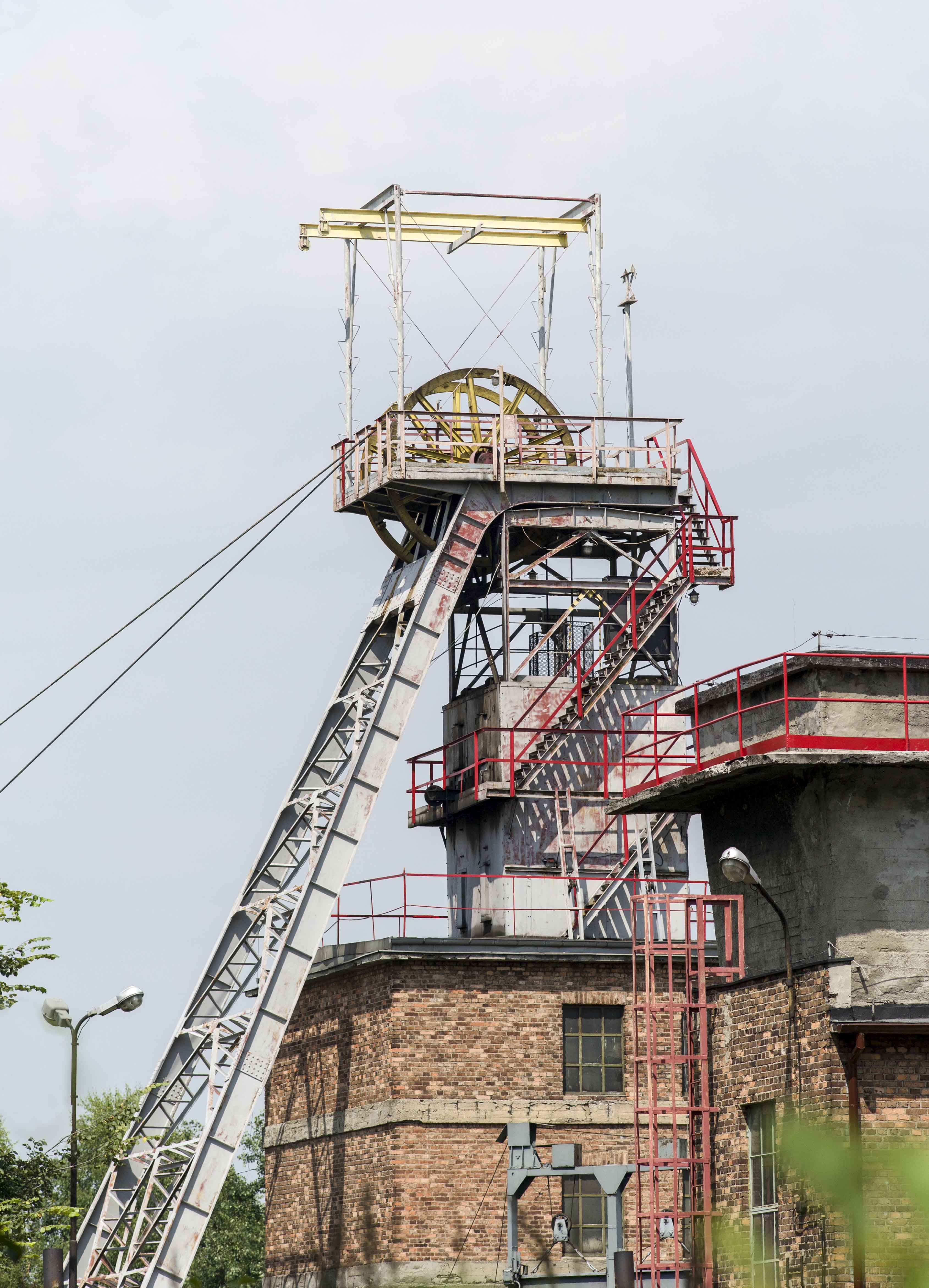 Piekary Śląskie, Polen, Wetterschacht Dolki im Ostfeld